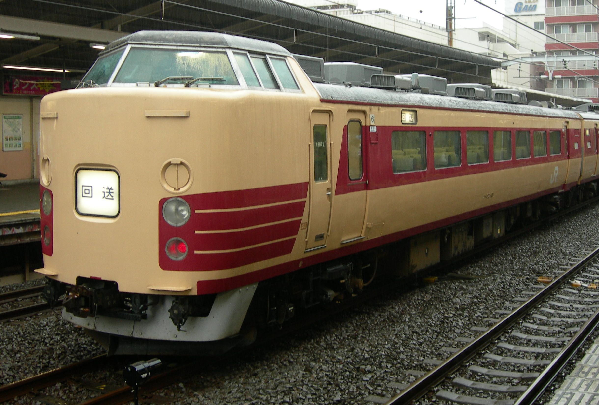 JR東日本 183系